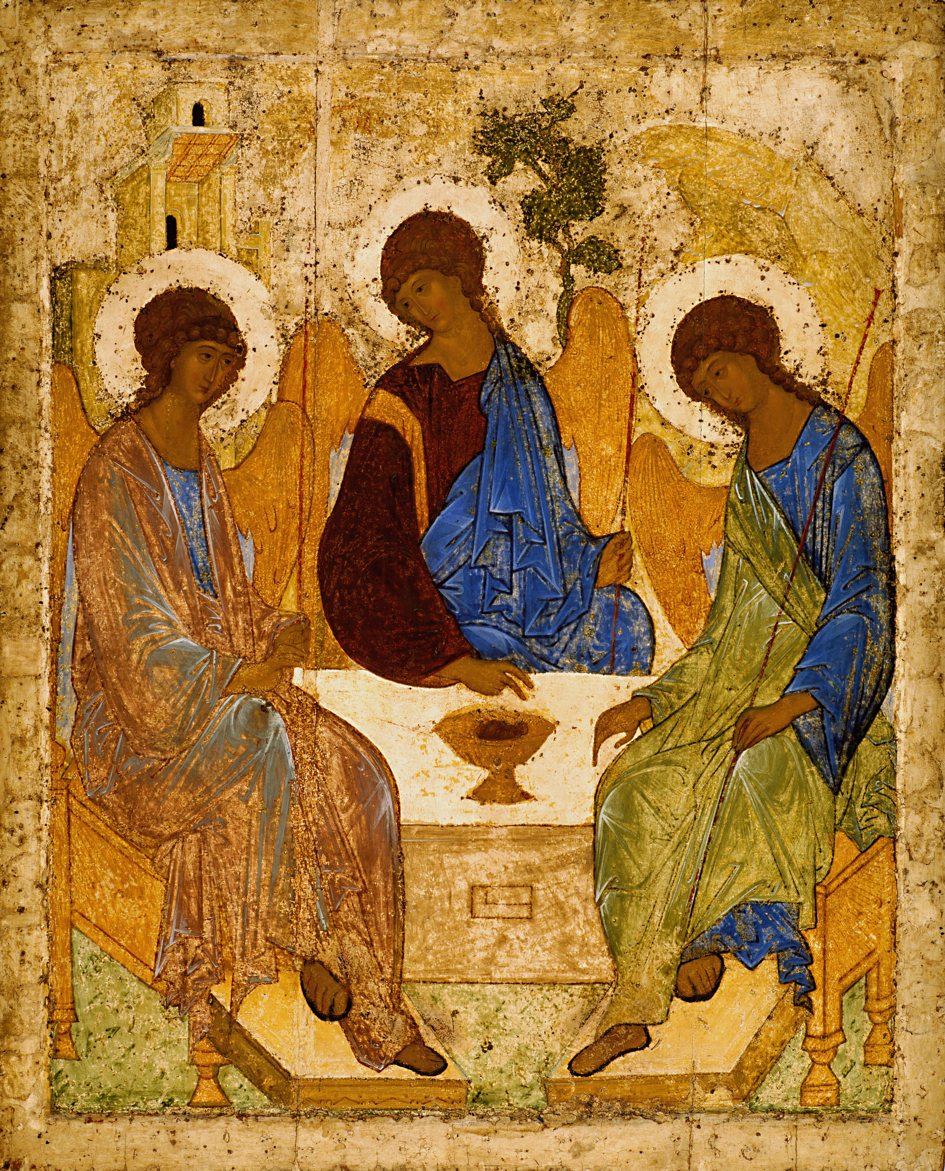 Икона «Троица» – самое знаменитое произведение гениального русского художника Андрея Рублева. По свидетельству одного из источников XVII века, она была написана «в похвалу Сергию Радонежскому» по заказу его ученика и преемника игумена Никона. В основе иконографии – библейский рассказ (Кн. Бытия, XVIII) о явлении праведному Аврааму божества в образе трех ангелов. Авраам с женою Сарой угощали ангелов под сенью Мамврийского дуба, и Аврааму дано было понять, что в ангелах воплотилось божество в трех лицах. Избегая подробностей, обычных в сюжете «Гостеприимство Авраамово», Андрей Рублев достигает исключительной символической глубины своего творения. В рублевской иконе внимание сосредоточено на трех ангелах, их безмолвном общении. Они изображены восседающими вокруг престола, в центре которого помещена евхаристическая чаша с головой жертвенного тельца, символизирующего новозаветного агнца, т. е. Христа. Левый и средний ангелы благословляют чашу. Бог Отец благословляет Бога Сына на смерть на кресте во имя любви к людям. Бог Дух Святой (правый ангел) присутствует здесь как утешитель, утверждая высокий смысл жертвенной, всепрощающей любви. Содержание «Троицы» не однозначно, памятник многогранен по своим темам, в первую очередь он воплощает идею о троичности Божества. Во времена Сергия Радонежского и Андрея Рублева тема Троицы воспринималась как символ духовного единства, взаимной любви, мира и готовности принести себя в жертву.